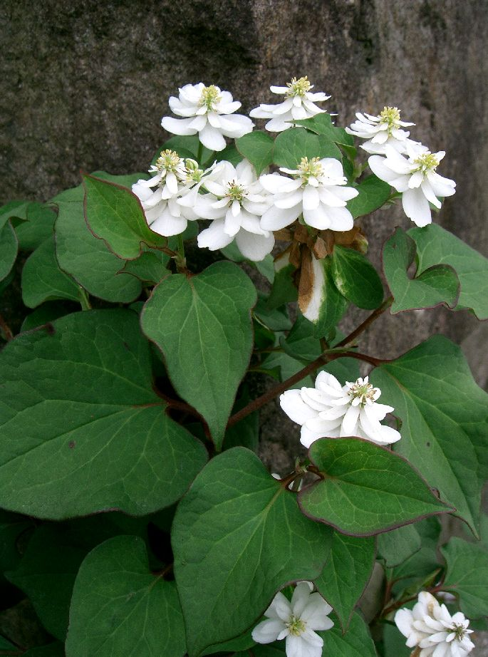 Houttuynia cordata